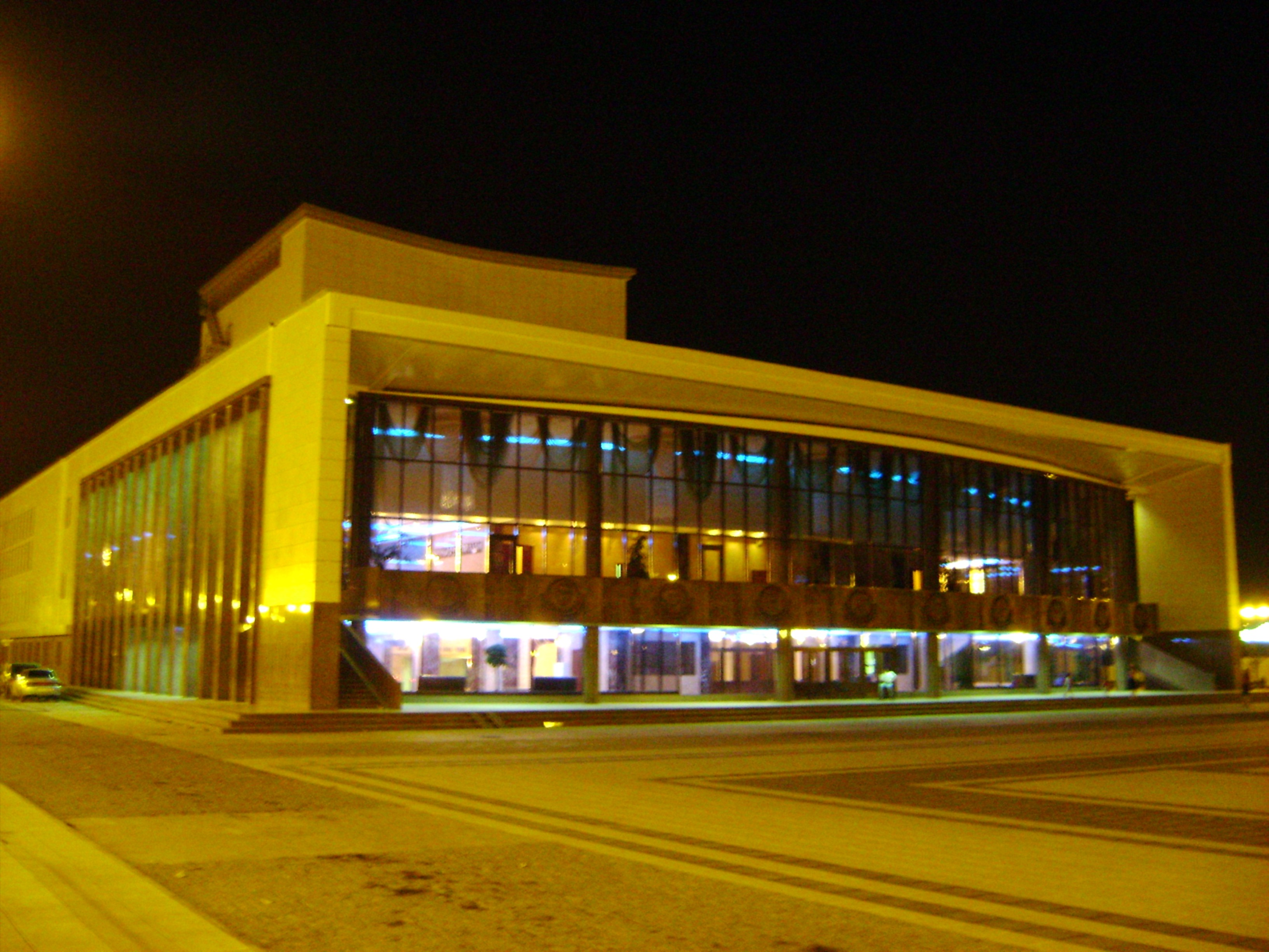 Грозненский театрально-концертный зал